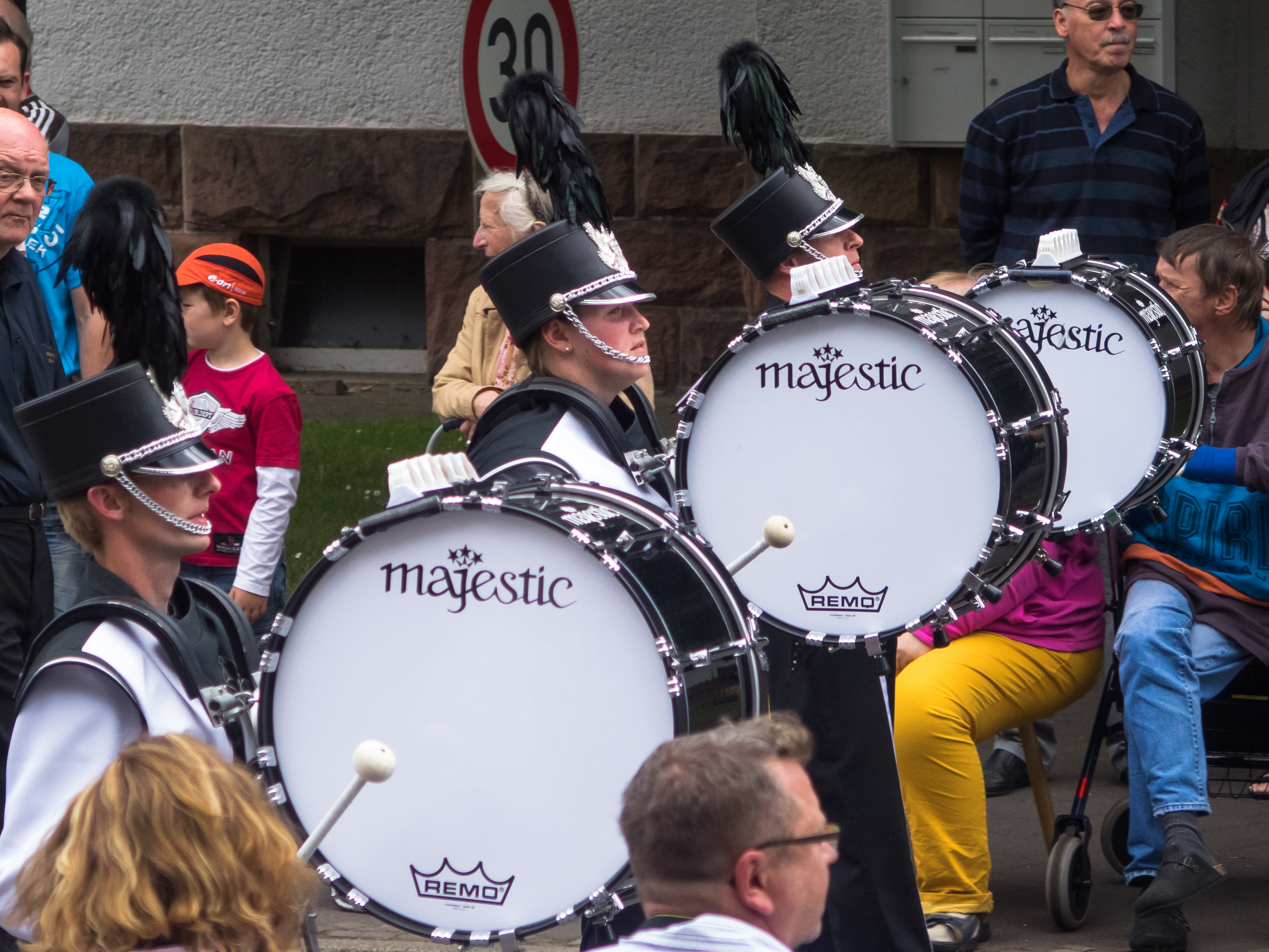 Festzug der Ziegenhainer Salatkirmes von 2014. Die "Show & Marchingband The Devils Witzenhausen".